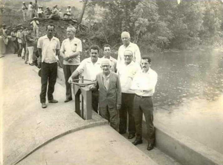 piumhi agua ribeirão_araras